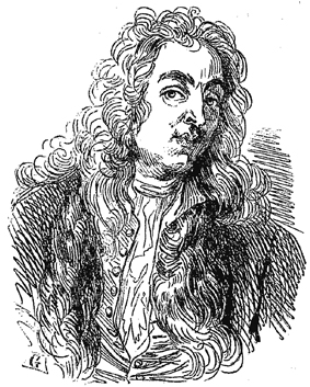 Portrait de Watteau